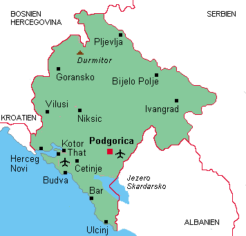 karta Montenegro Holger Behr